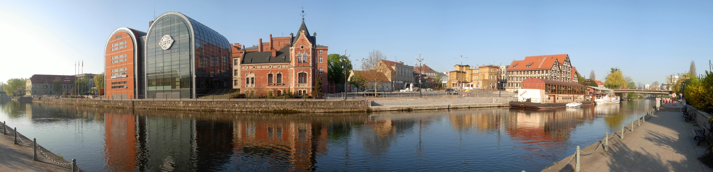 Południowe nabrzeże Brdy w centrum Bydgoszczy